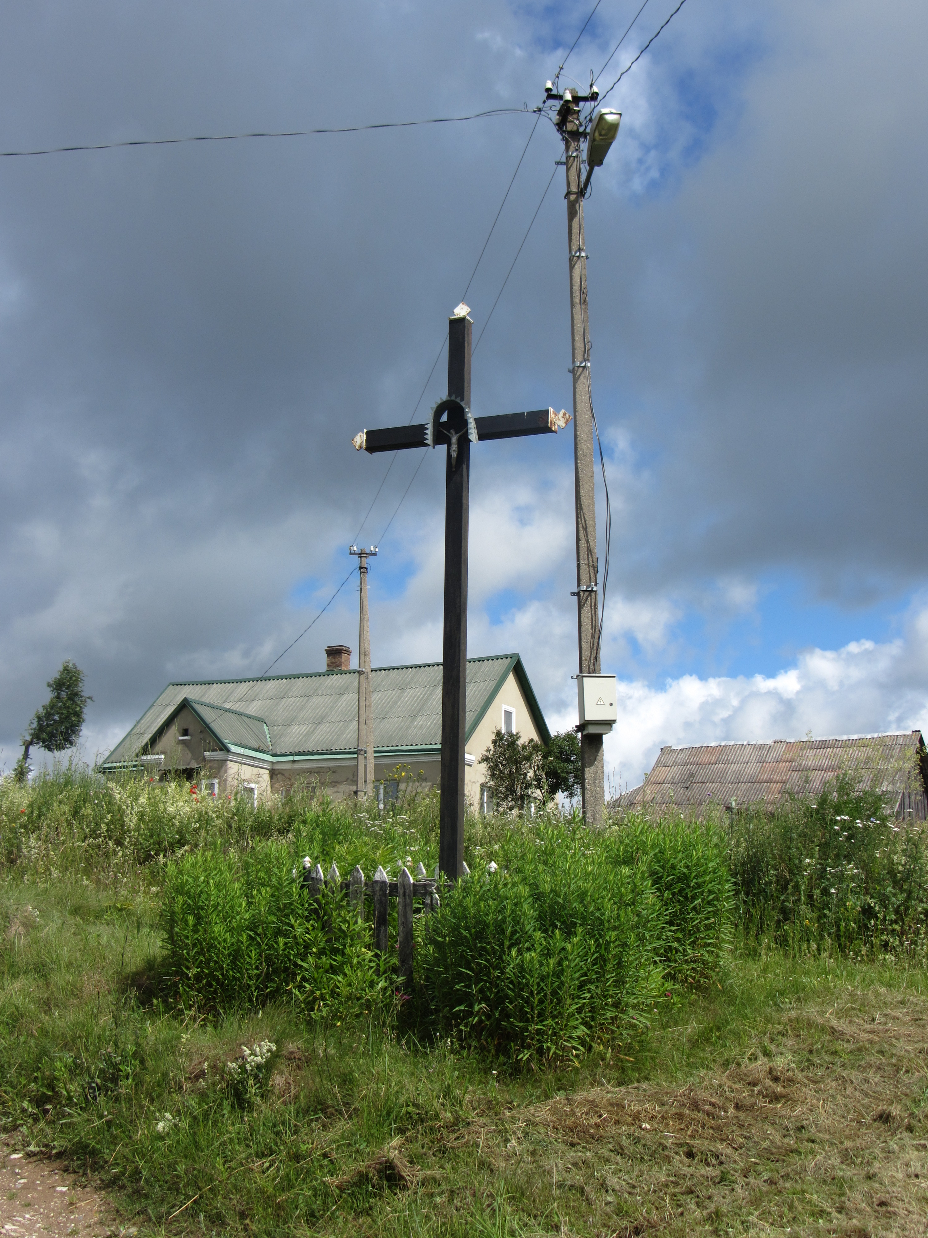 Vaivadiškės, Lithuania